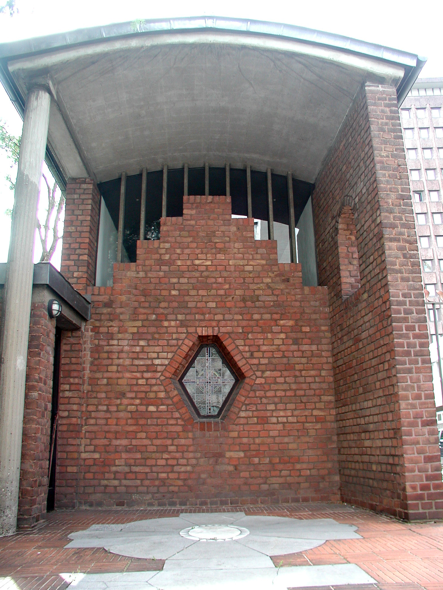 Köln, St. Maria ad Ortum Kapelle